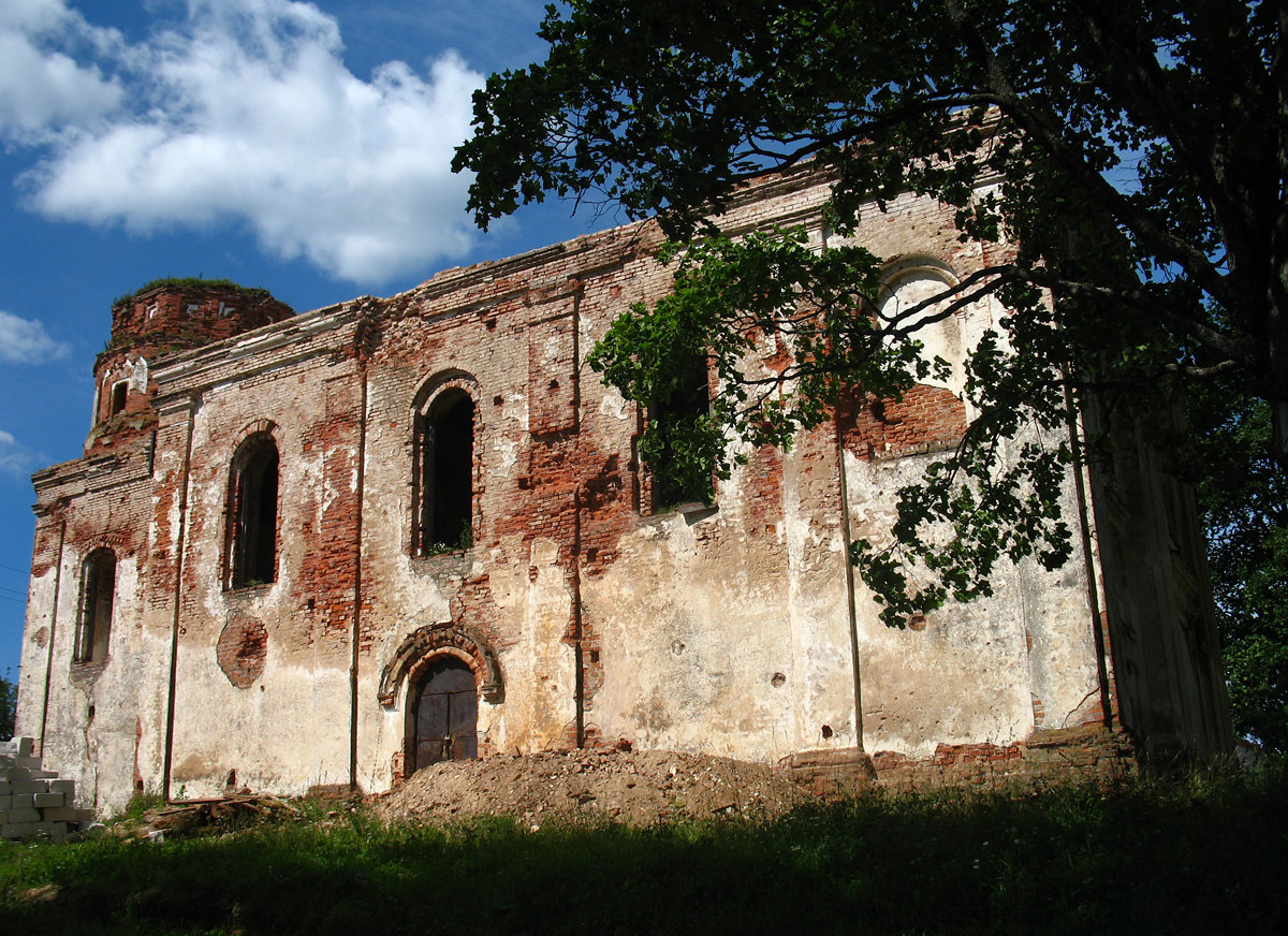 Беларуская (тарашкевіца): Астроўна (Astroŭna)